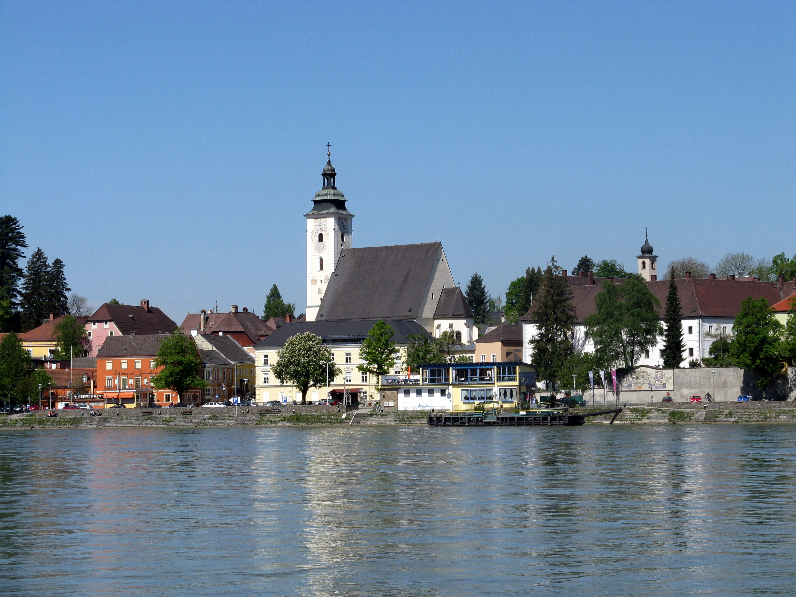 Ansicht von Grein mit Kirche